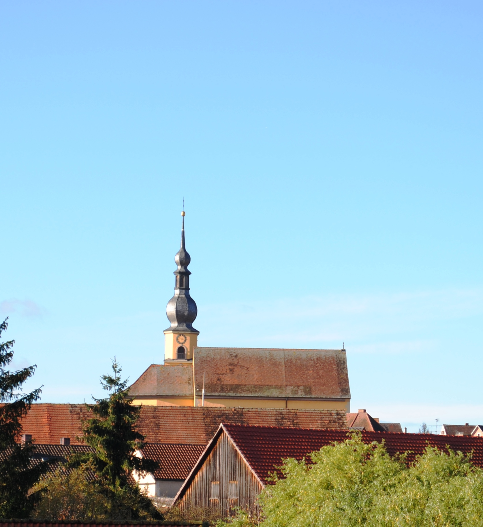 Panorama, Kirche St. Martin, Willanzheim